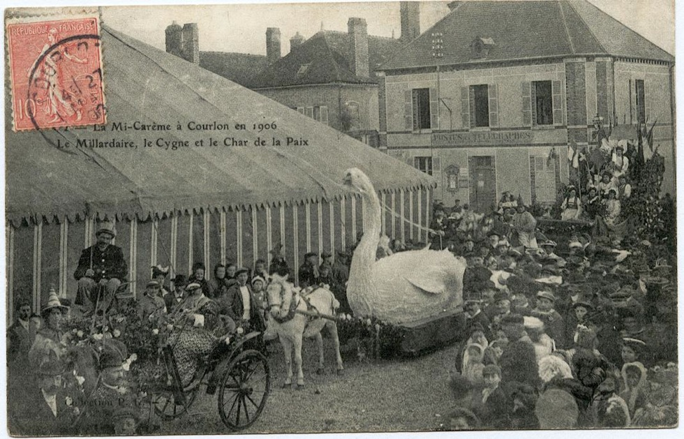 La Mi-Carême 1906 à Courlon.